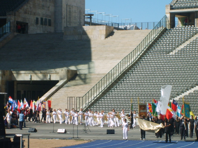 Umzug zu Beginn der Veranstaltung Calling All Nations